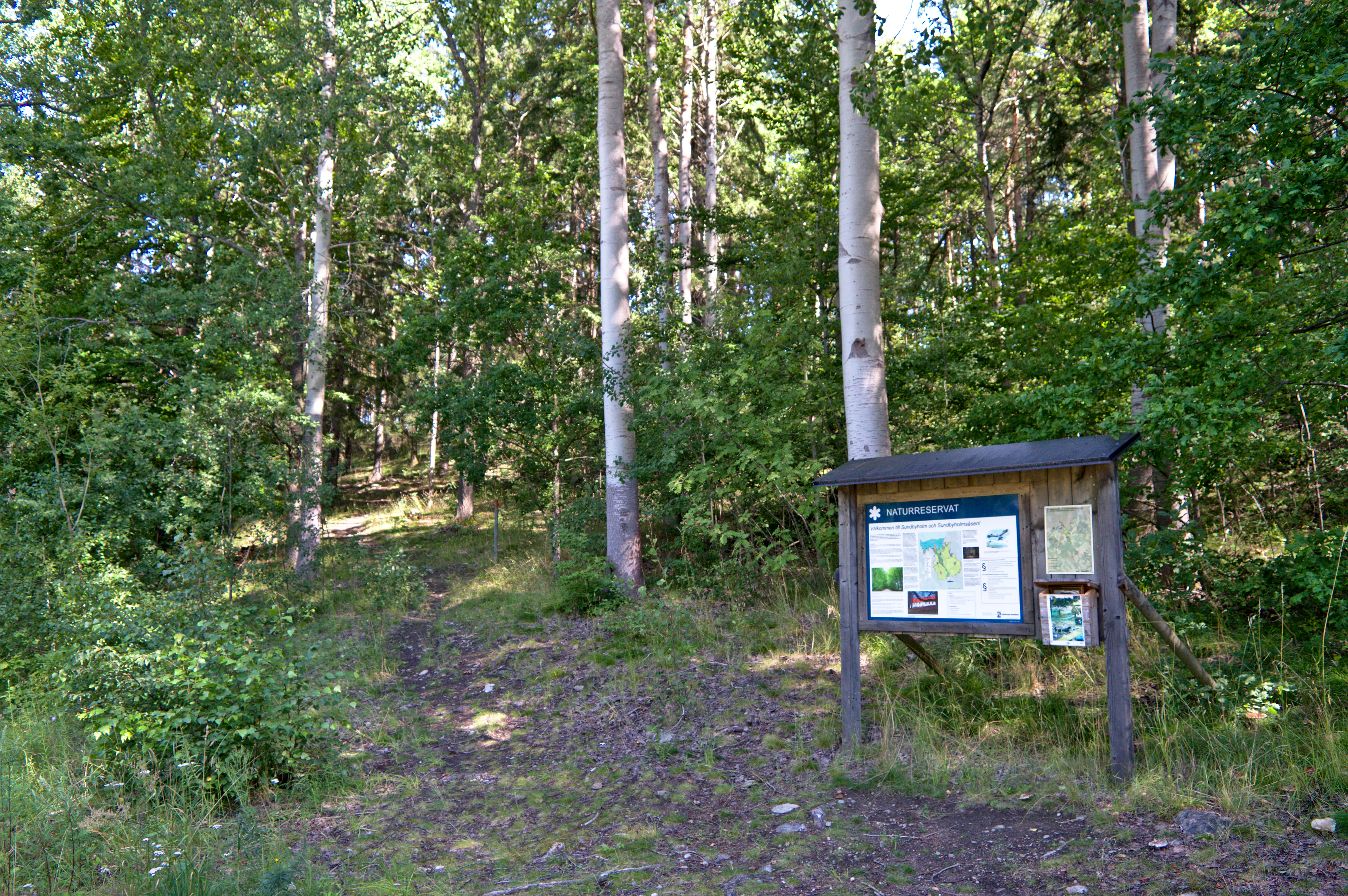 Sundbyholmsåsens naturreservat. Skylt vid parkeringen och början på stig uppåt.